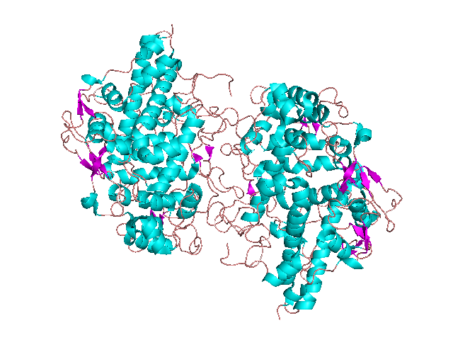 Animal heme-dependent peroxidase 1dnu (HUMAN MYELOPEROXIDASE-THIOCYANATE)